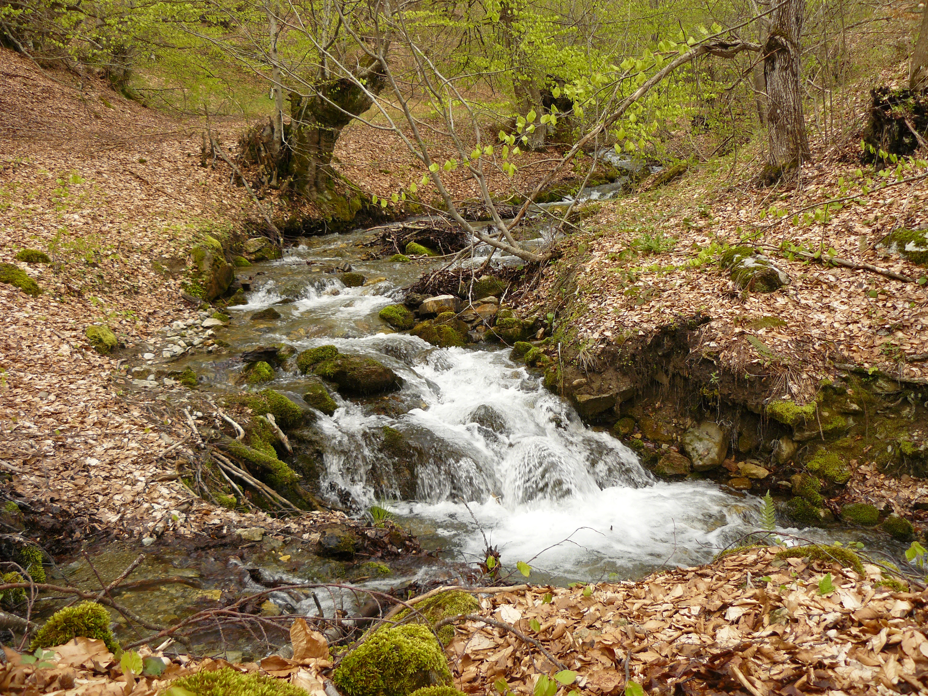 Тајмишка Река кај с. Тајмиште на планината Бистра.